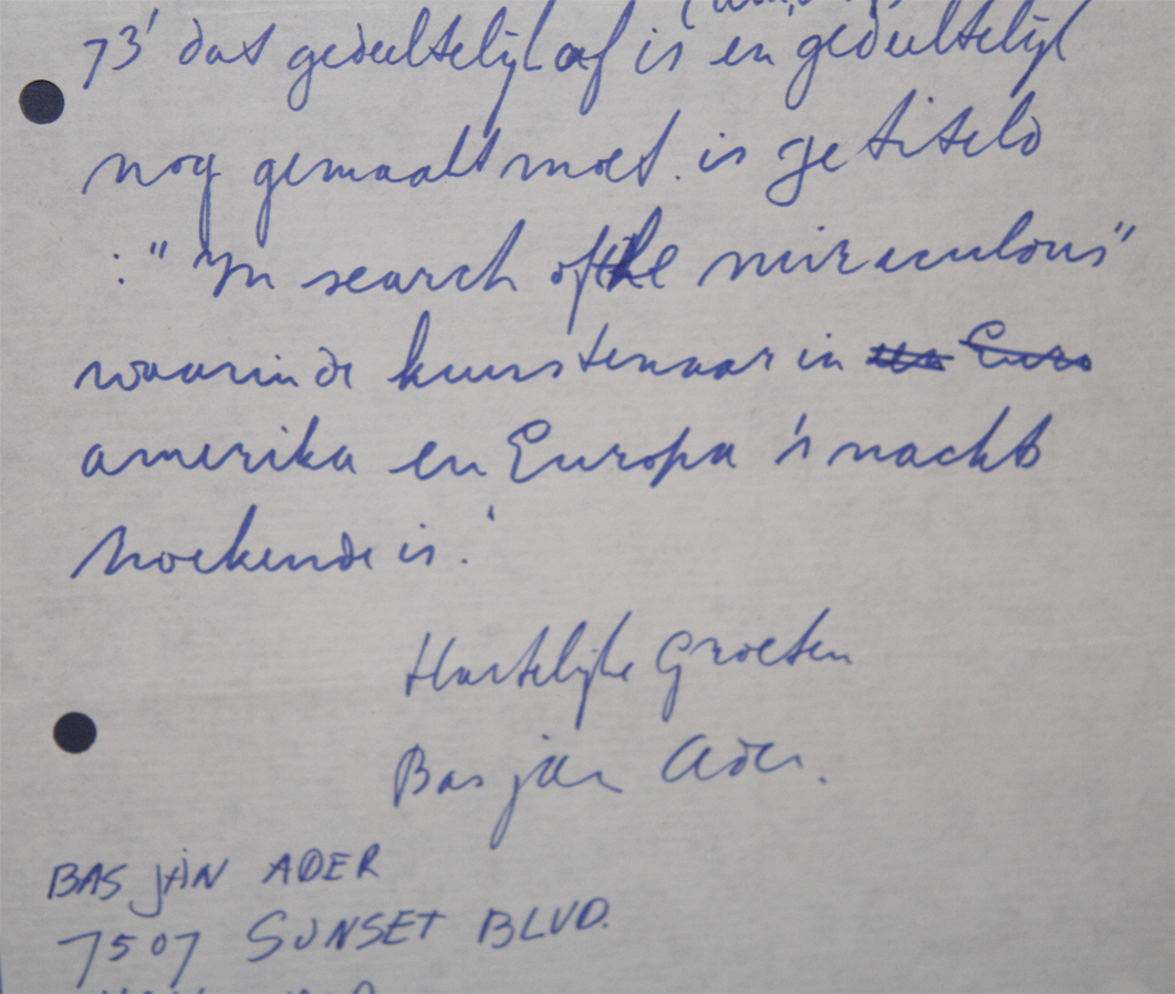 Foto van brief uit BvB Rotterdam.